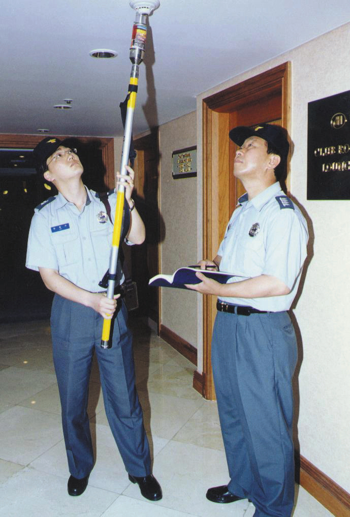 서울특별시 소방공무원 예방활동